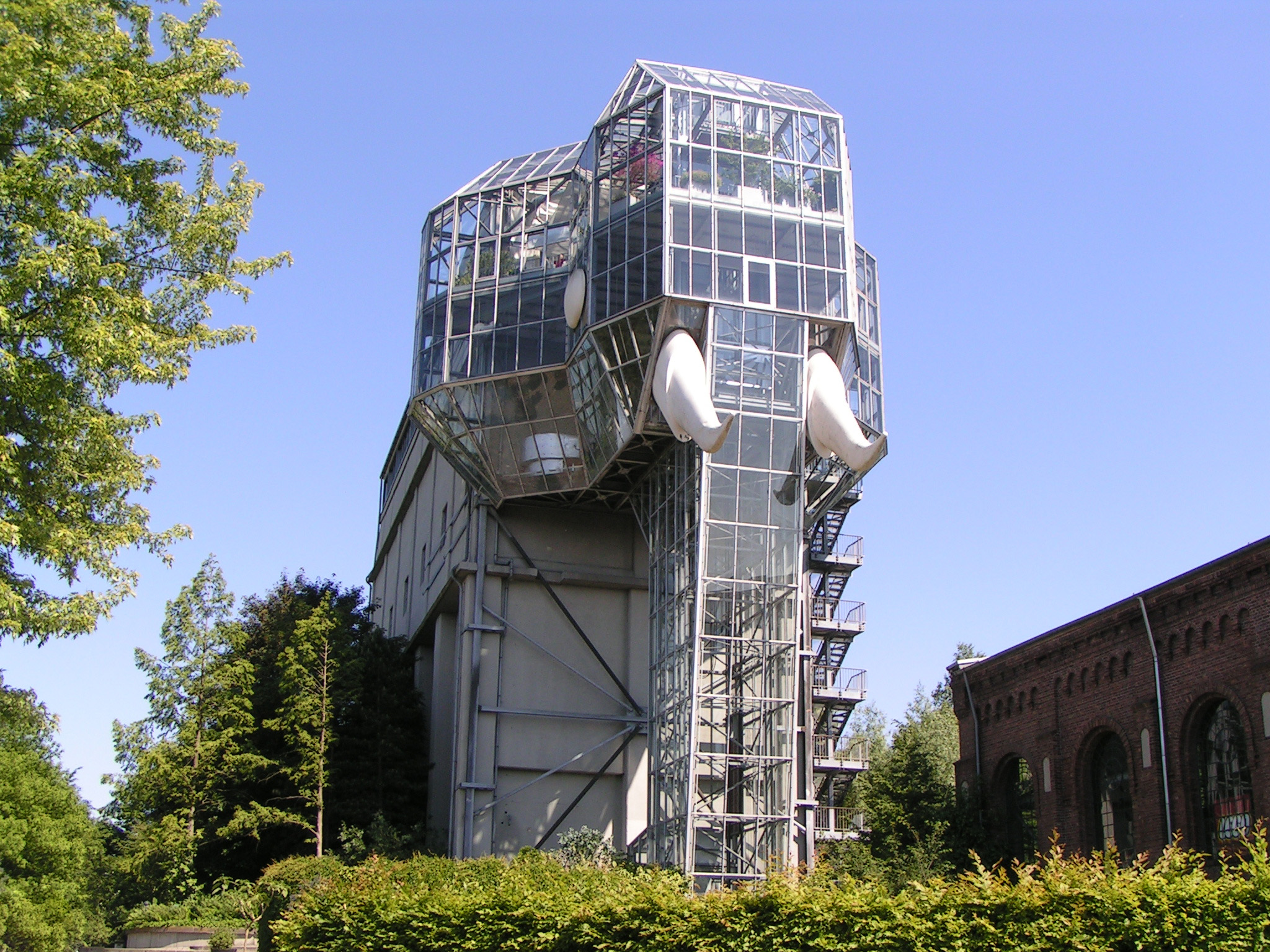 Elefantenformiges Gebäude im Maximilianpark.